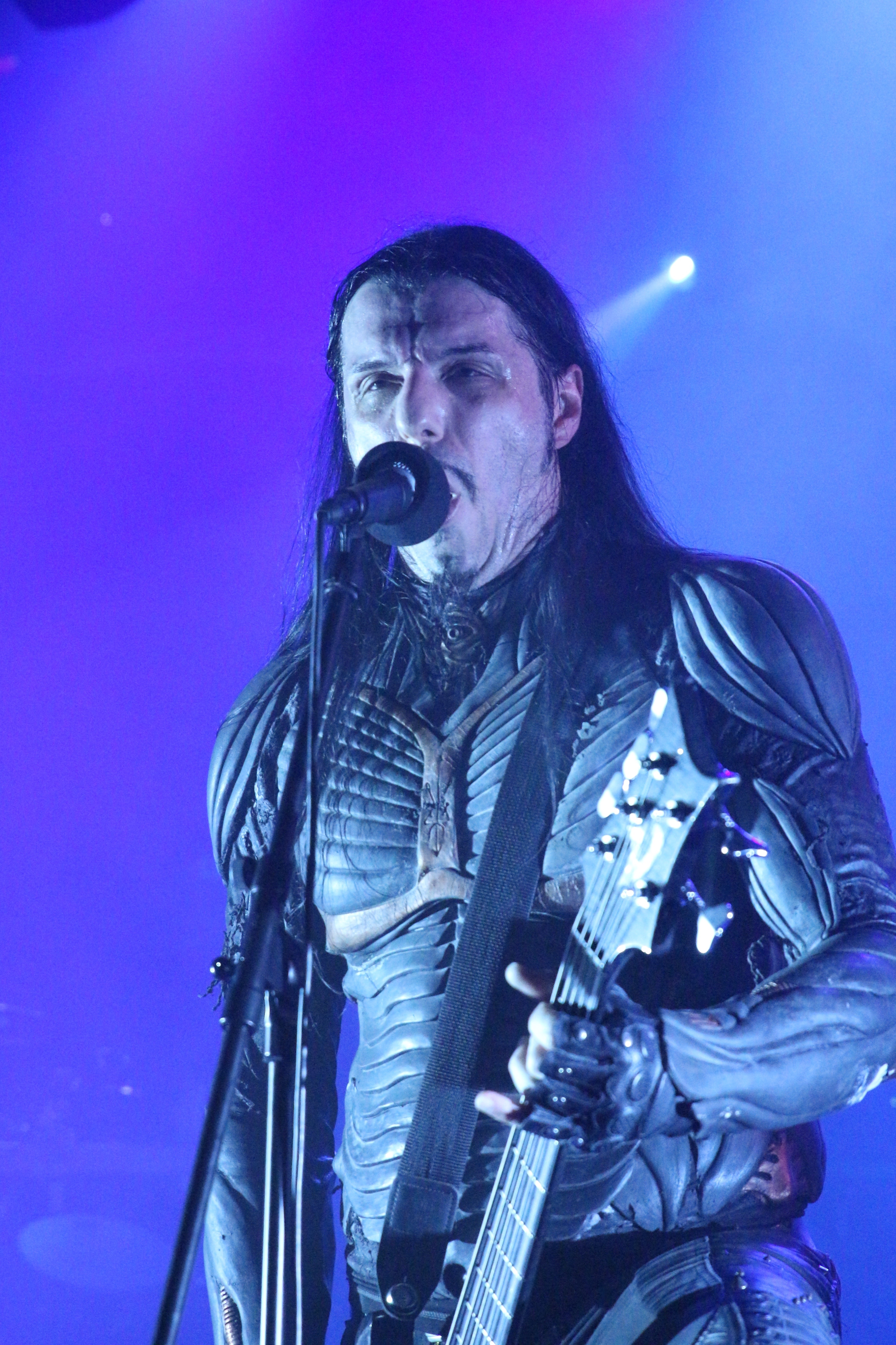 Septicflesh (black-métal symphonique, Grèce) en concert au Rocking Chair de Vevey avec Borgne et Moonspell, 21 mars 2015